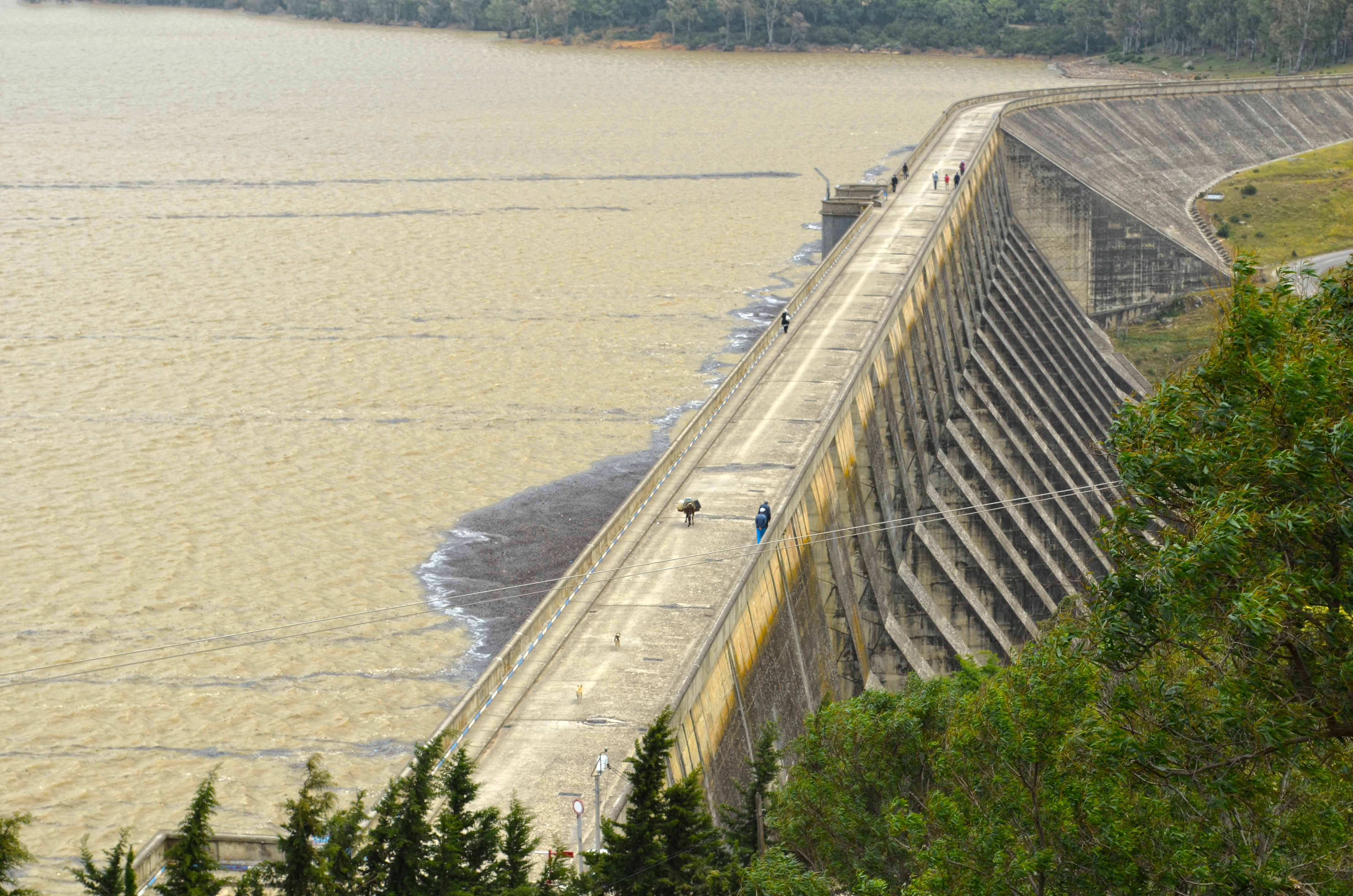 Vue générale du barrage de Beni Mtir au nord ouest de la Tunisie.